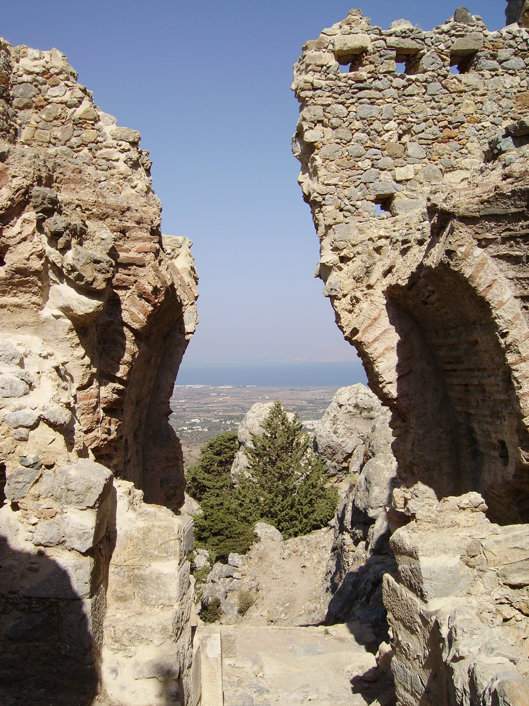 PaleoPyli08.JPG